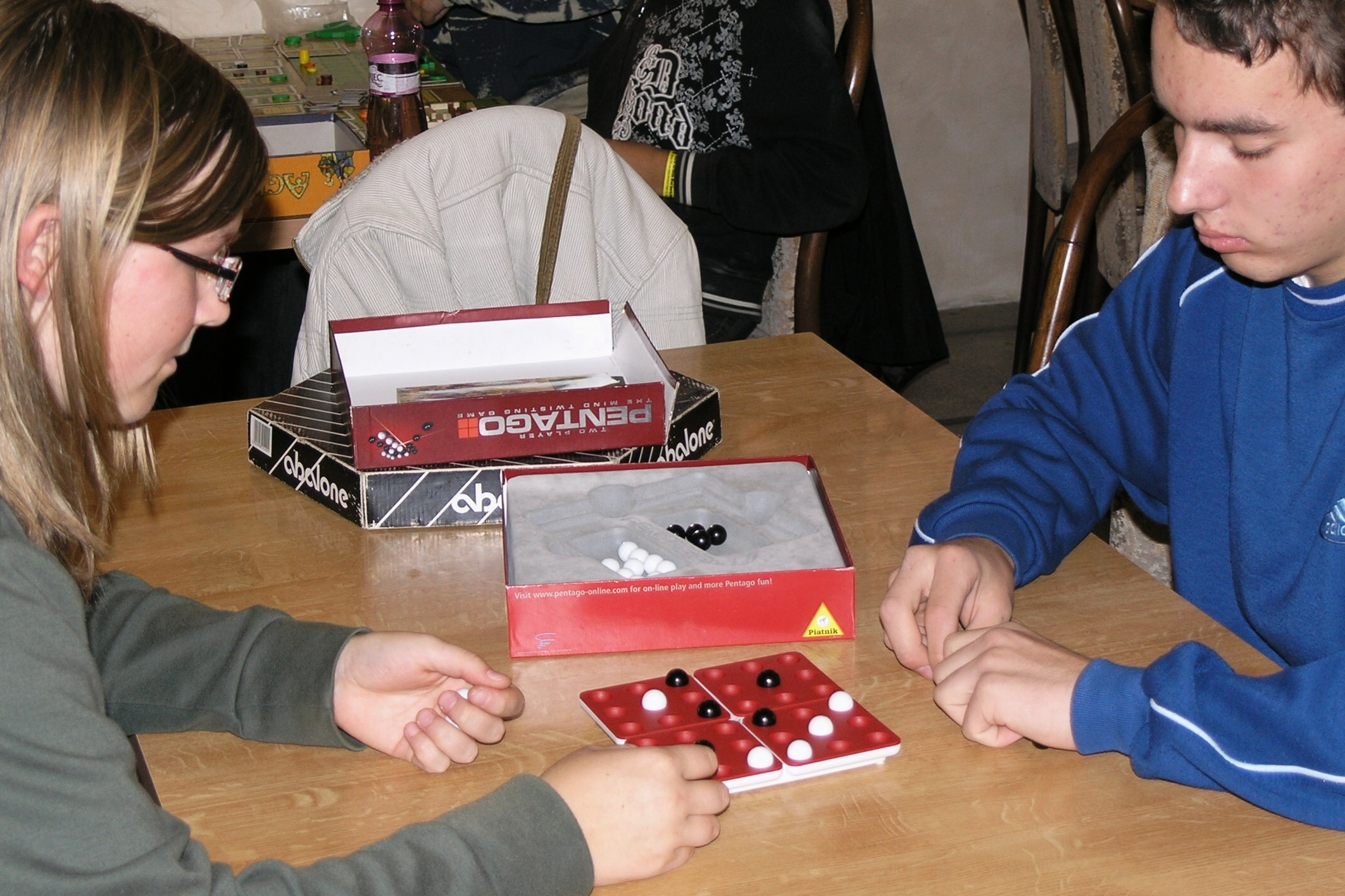 Deskohraní 2008